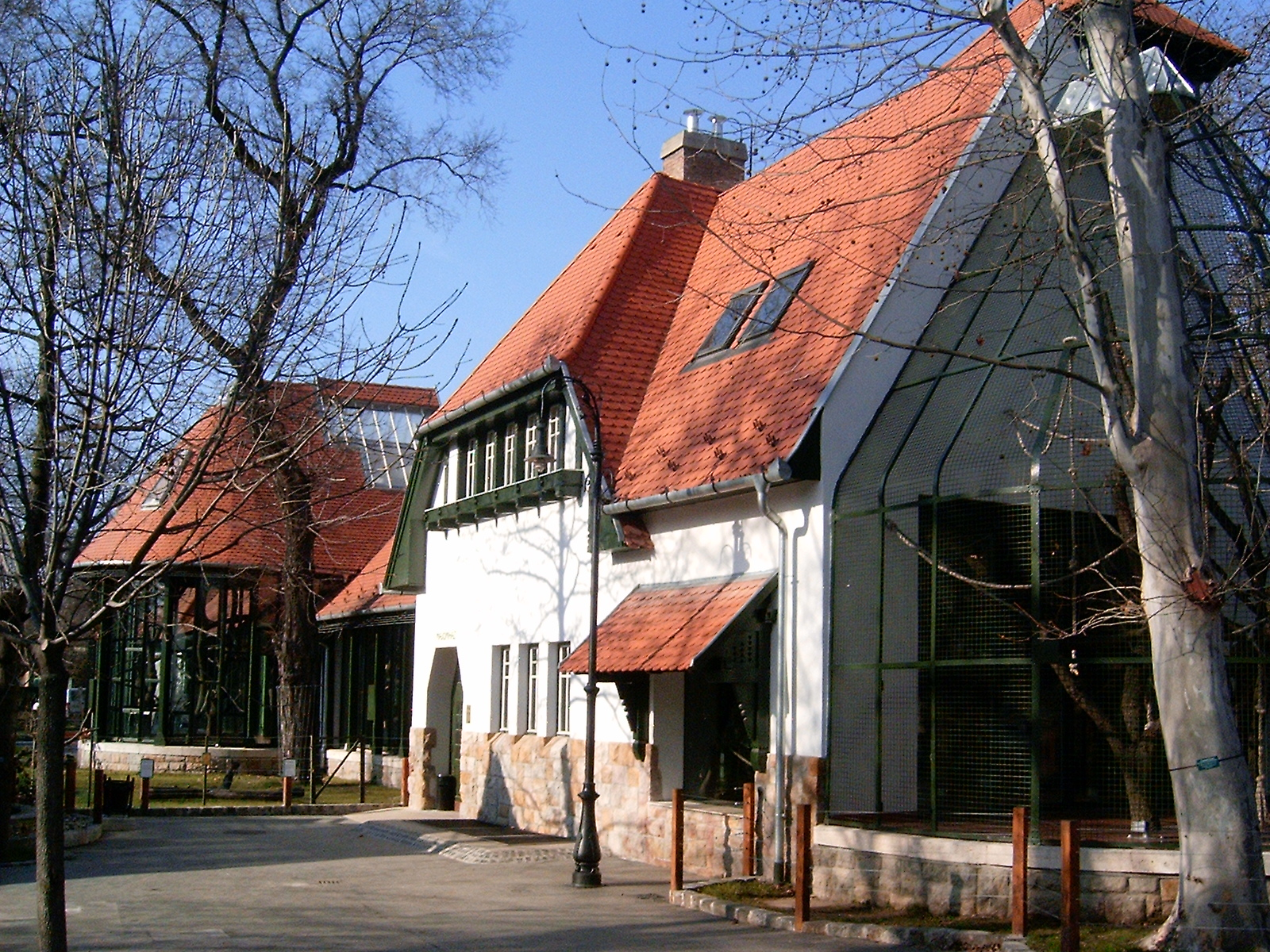 Budapesti állatkert, Majomház